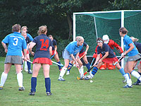 Spielszene Oberliga Jahn Oelde - Eintracht Dortmund 2003